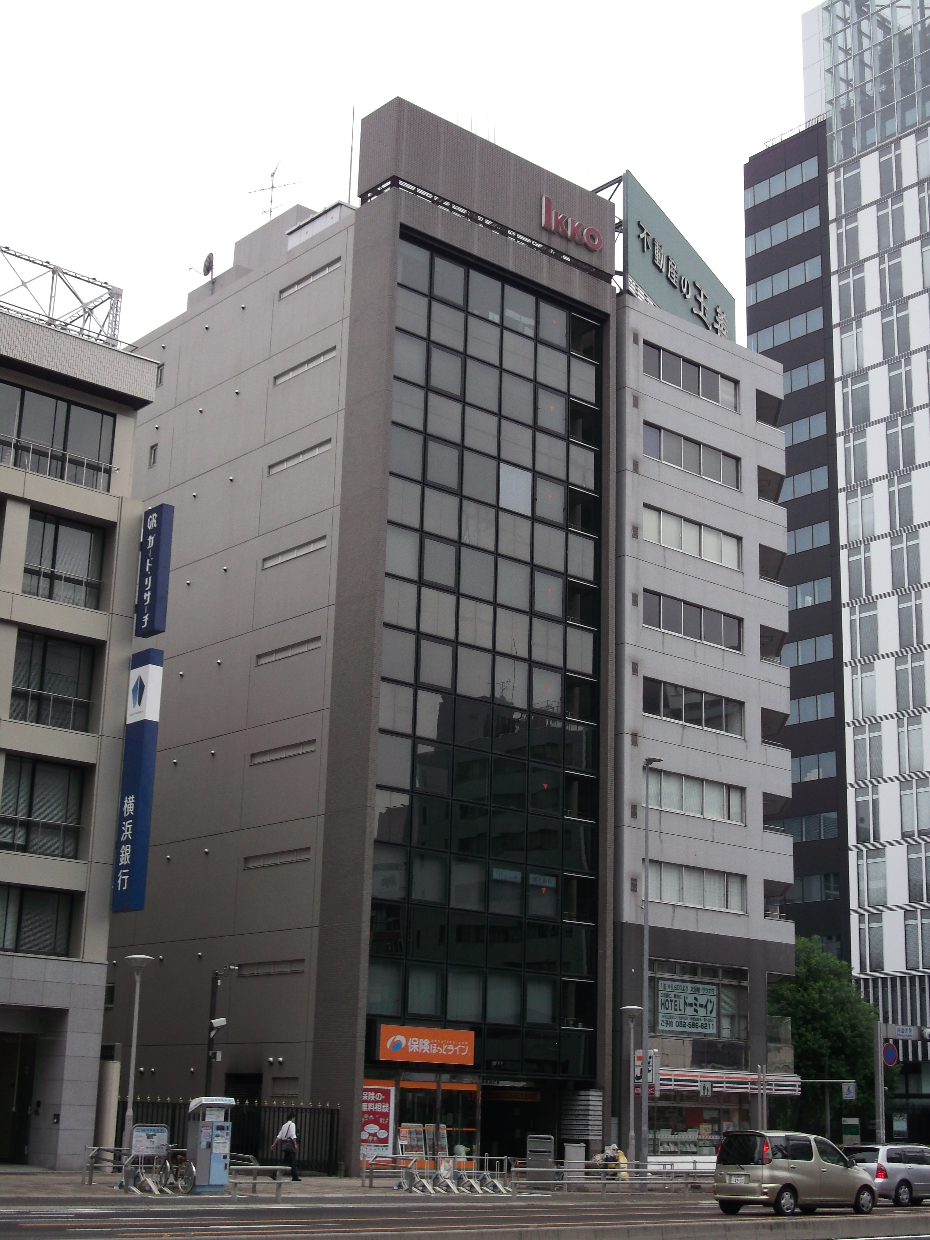 名古屋市中区錦一丁目の一光伏見ビルを東側公道南側より撮影